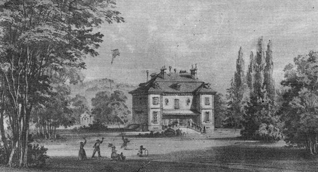 Замок Бельфонтен